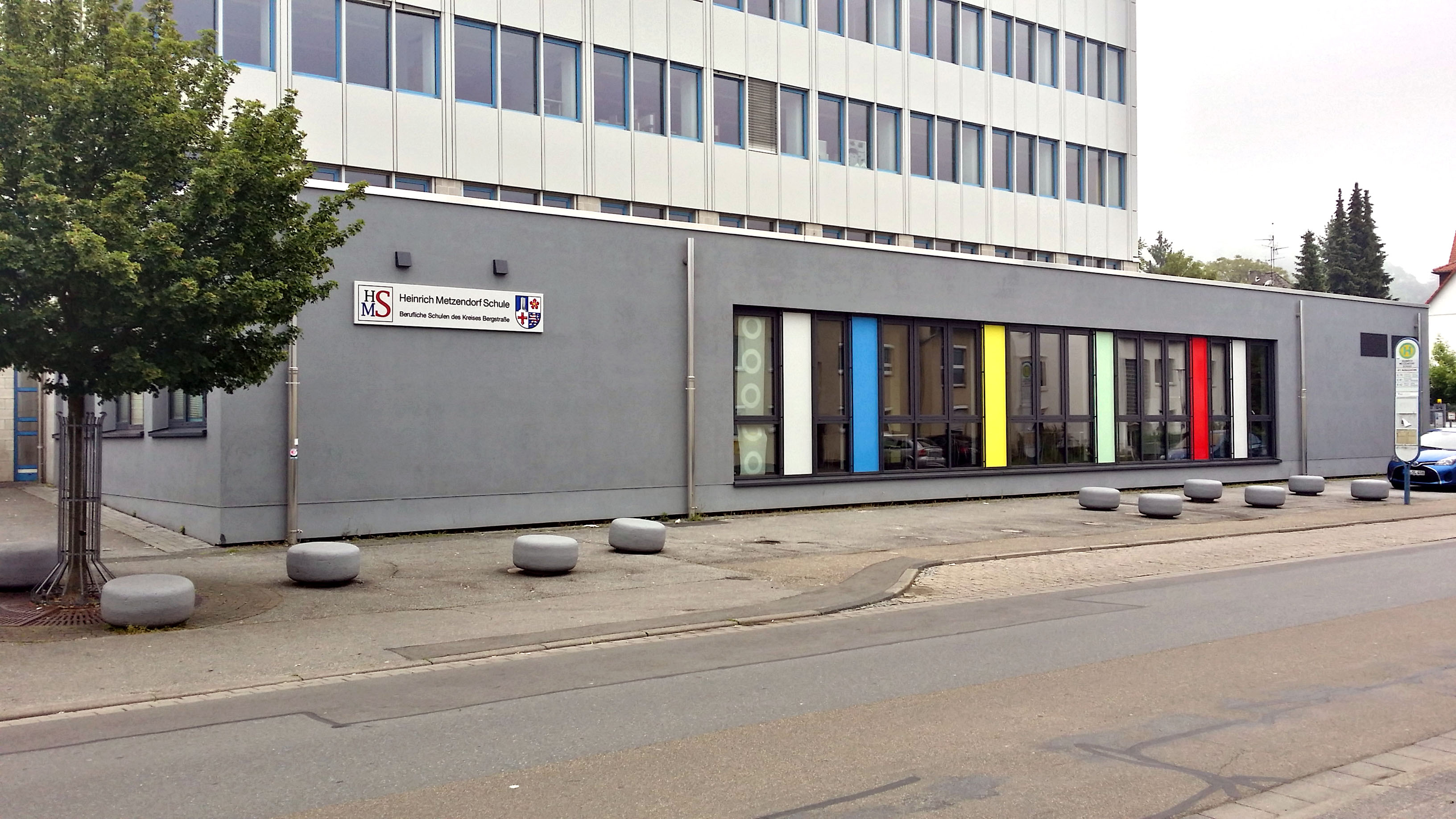 HMS Metzeria